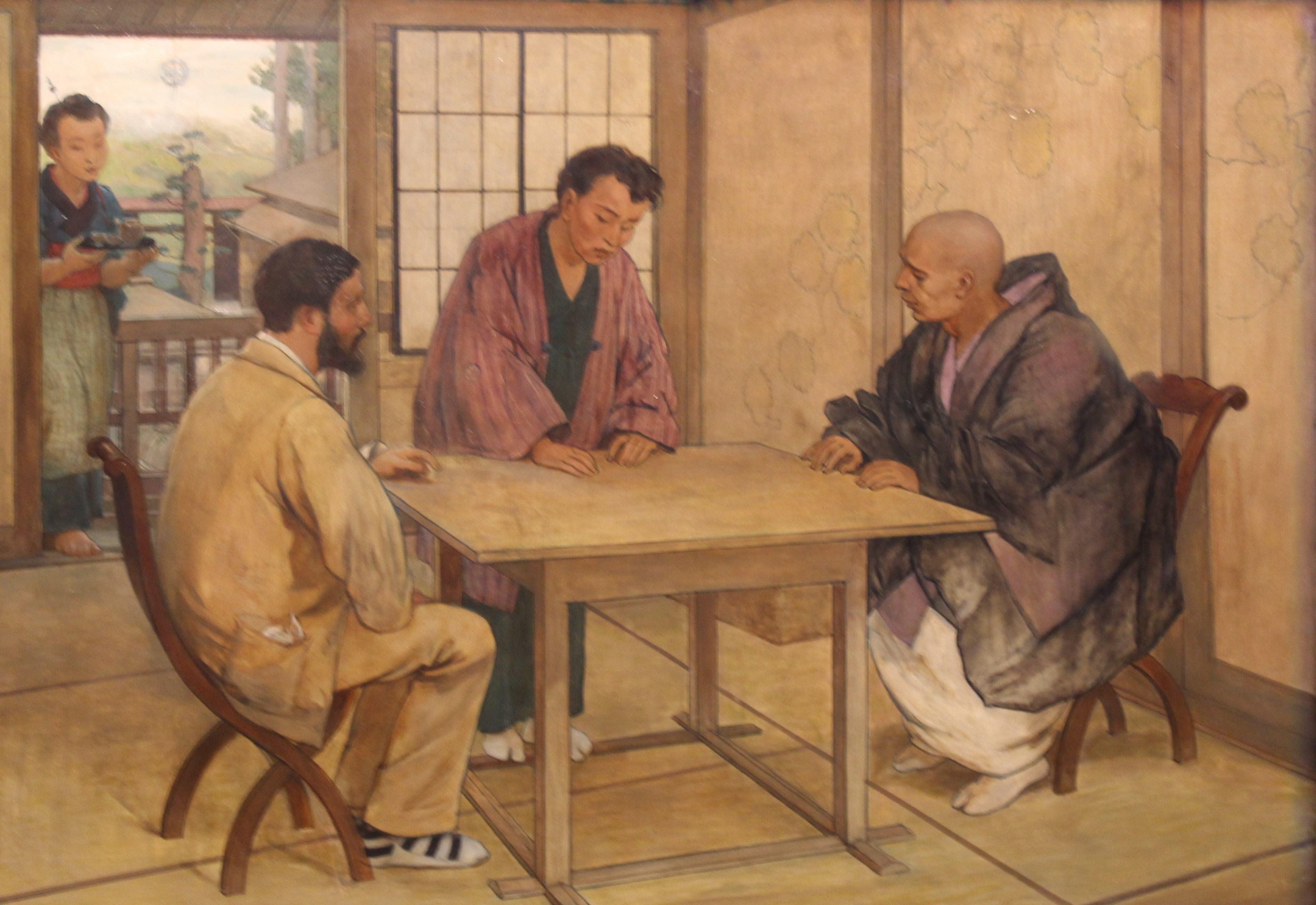 Un tableau de Félix Régamey au Musée des Confluences de Lyon.